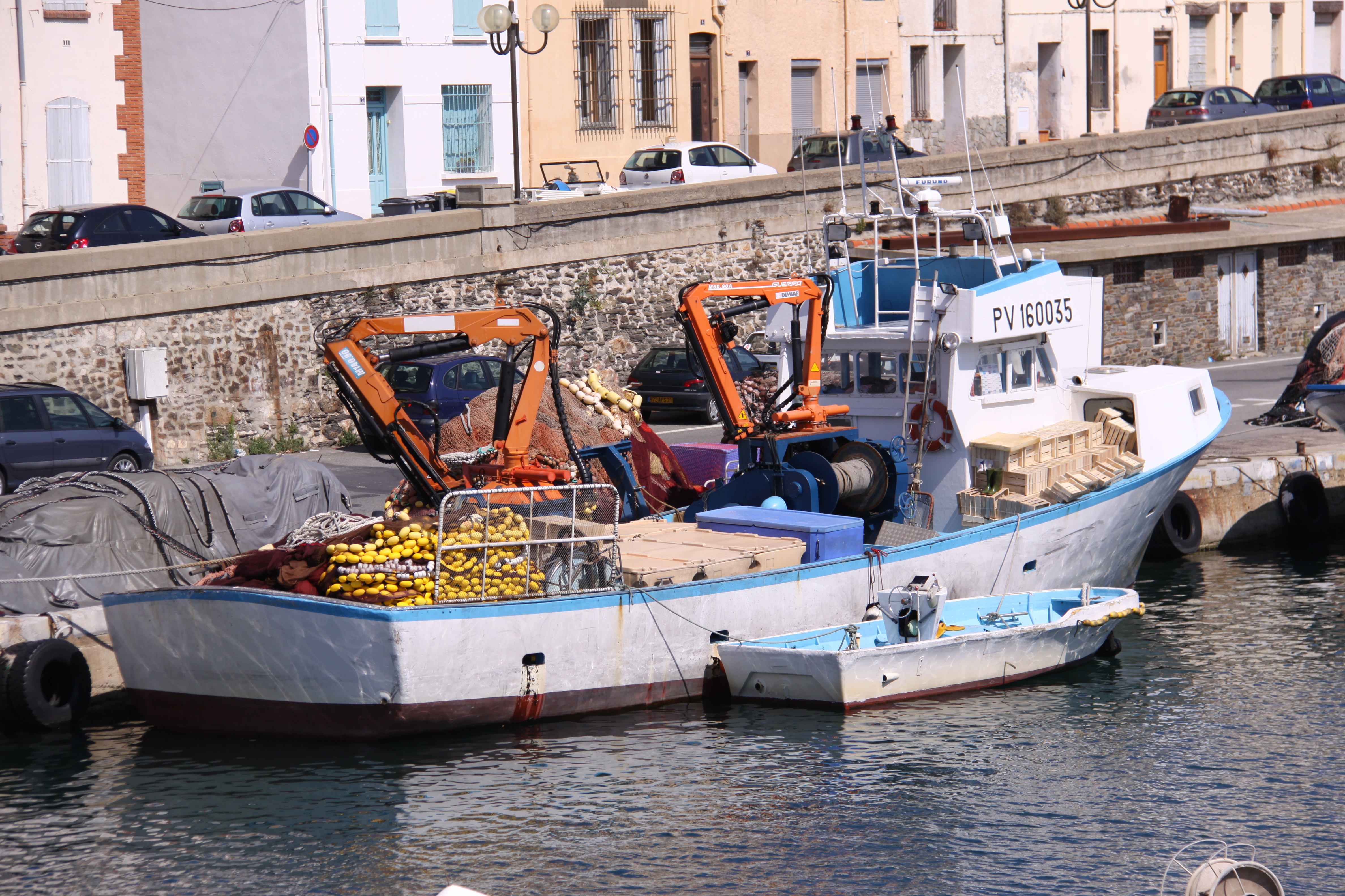 Le senneur "Oued Souss" et son canot auxiliaire. Le "Oued Souss" a été construit en 1972. Sa coque est en polyester. Il mesure 21,47 mètres de long et 6,20 de large. La puissance de son moteur est de 316 kw. Son port d' attache est Port-Vendres. Le "Oued Souss" est utilisé pour pêcher essentiellemnt de la sardine. Il peut également servir à pêcher le thon. Immatriculation: PV 160035. Port-Vendres, Pyrénées-Orientales, France.